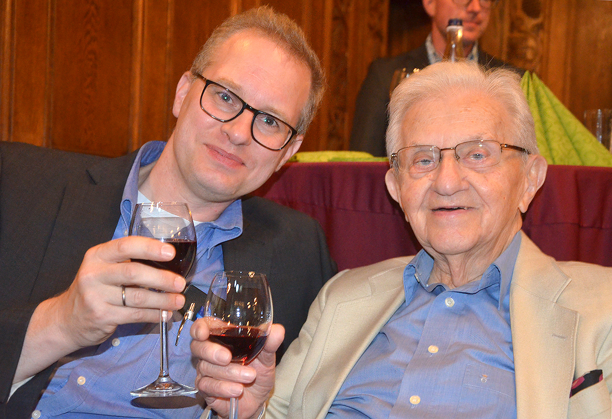 Zu den Gästen aus Politik, Wirtschaft und Kultur, die der Musikwissenschaftler, Dirigent und Ehrenpräsident der Siegmund-Seligmann-Stiftung Andor Izsák zur Feier seines 72. Geburtstages in die Villa Seligmann geladen hatte, zählten auch der Redakteur der Hannoverschen Allgemeinen Zeitung, Simon Benne (links), der hier mit Henry Korman, einem der letzten Zeitzeugen und Holocaust-Überlebenden, mit einem guten Glas Wein anstößt ...